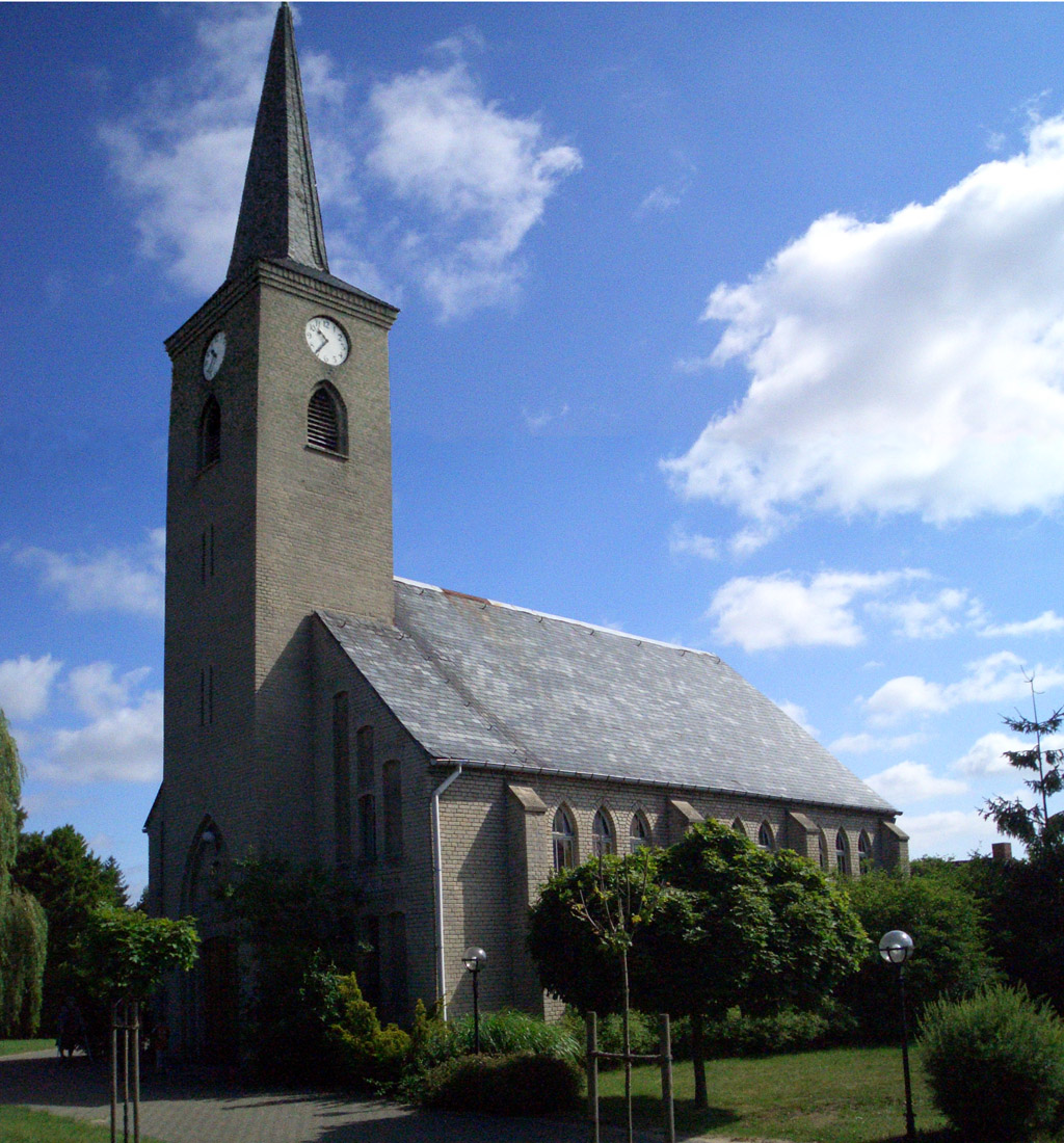 Gefallenengedächtniskirche in Lüdelsen